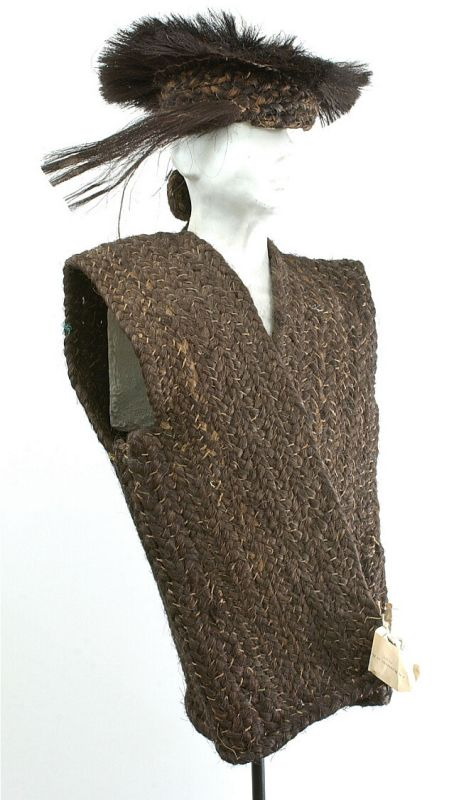 Kostuum (onderdeel). Hemd van sagovezel, behorende bij krijgskostuum